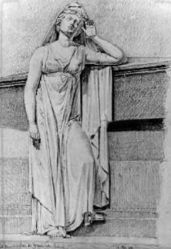 Statue vom Zeppelin´schen Grabmal. Studie (Bleistiftzeichnung) von General Eduard von Kallee, 12.10.1838 Eduard von Kallee 1818-1888 aus dem 1. Skizzenbuch